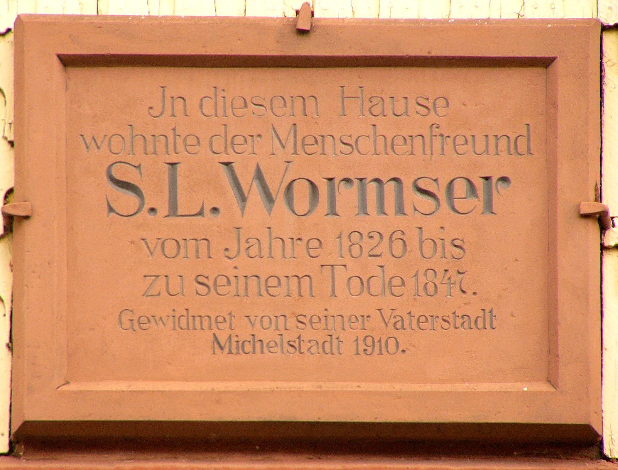 Gedenktafel am Wohnhaus von Seckel Löb Wormser in der Erbacherstr. 12 in Michelstadt.